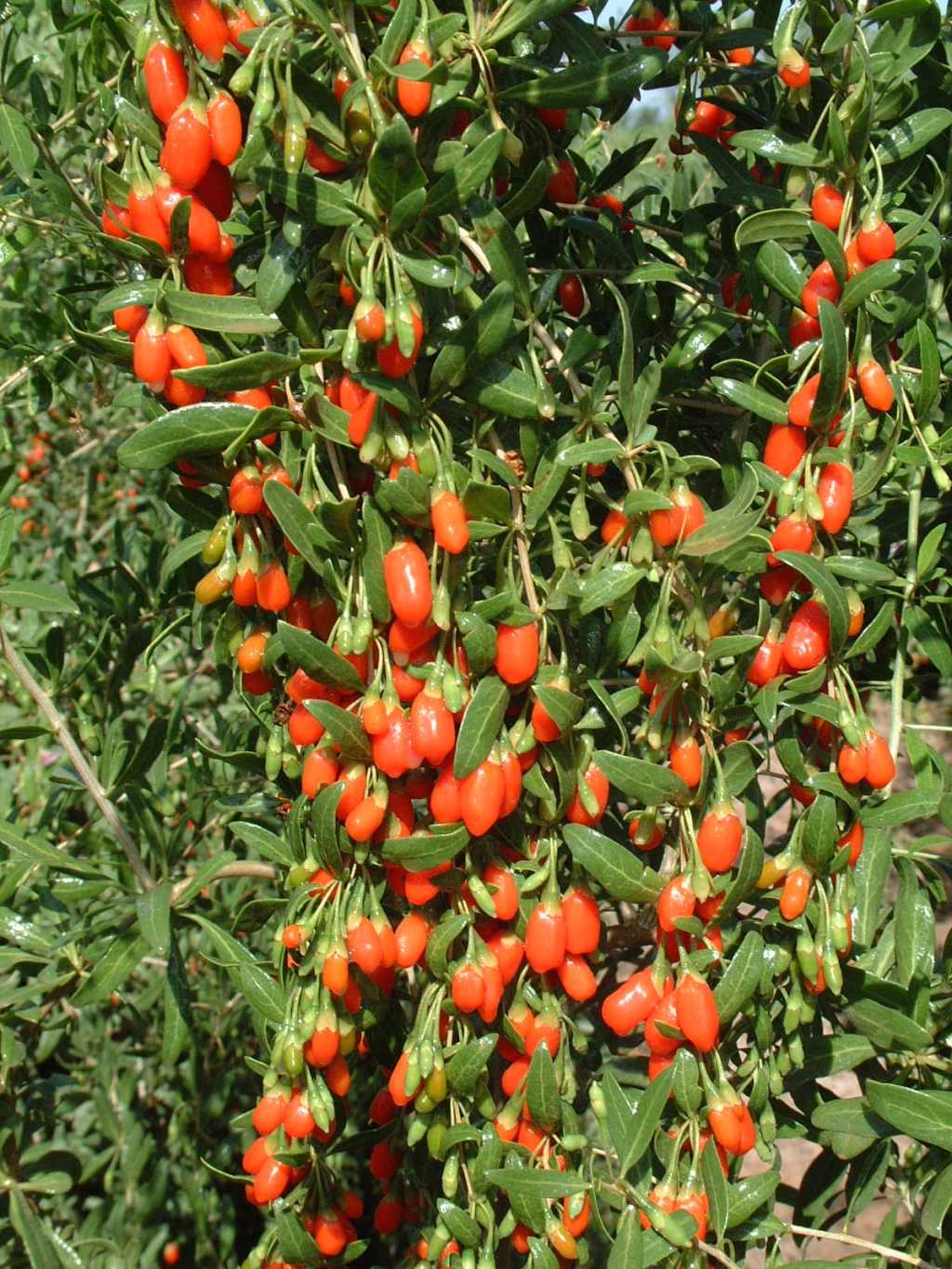 plody goji